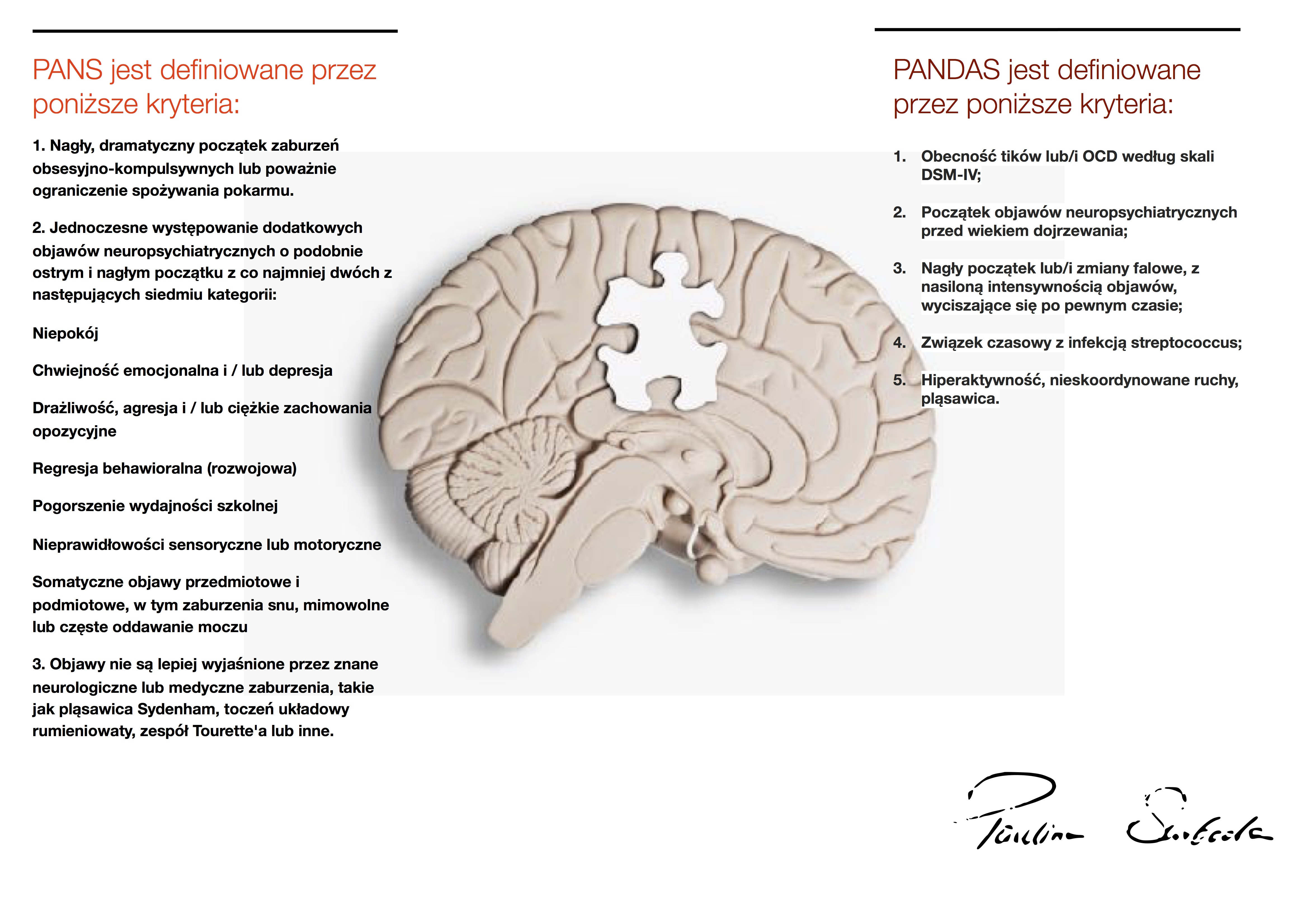 Kryteria diagnostyczne w zespole PANDAS należącego do PANS (NAGŁY PEDIATRYCZNY ZESPÓŁ NEUROPSYCHIATRYCZNY)